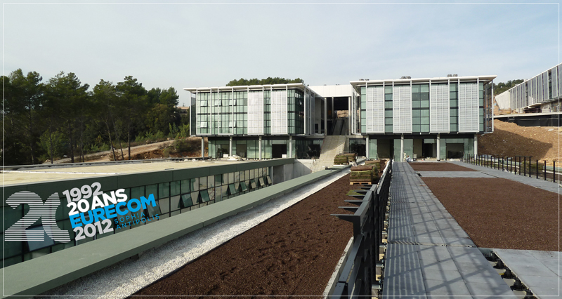 Batiment EURECOM au coeur du Campus SophiaTech, Face sud